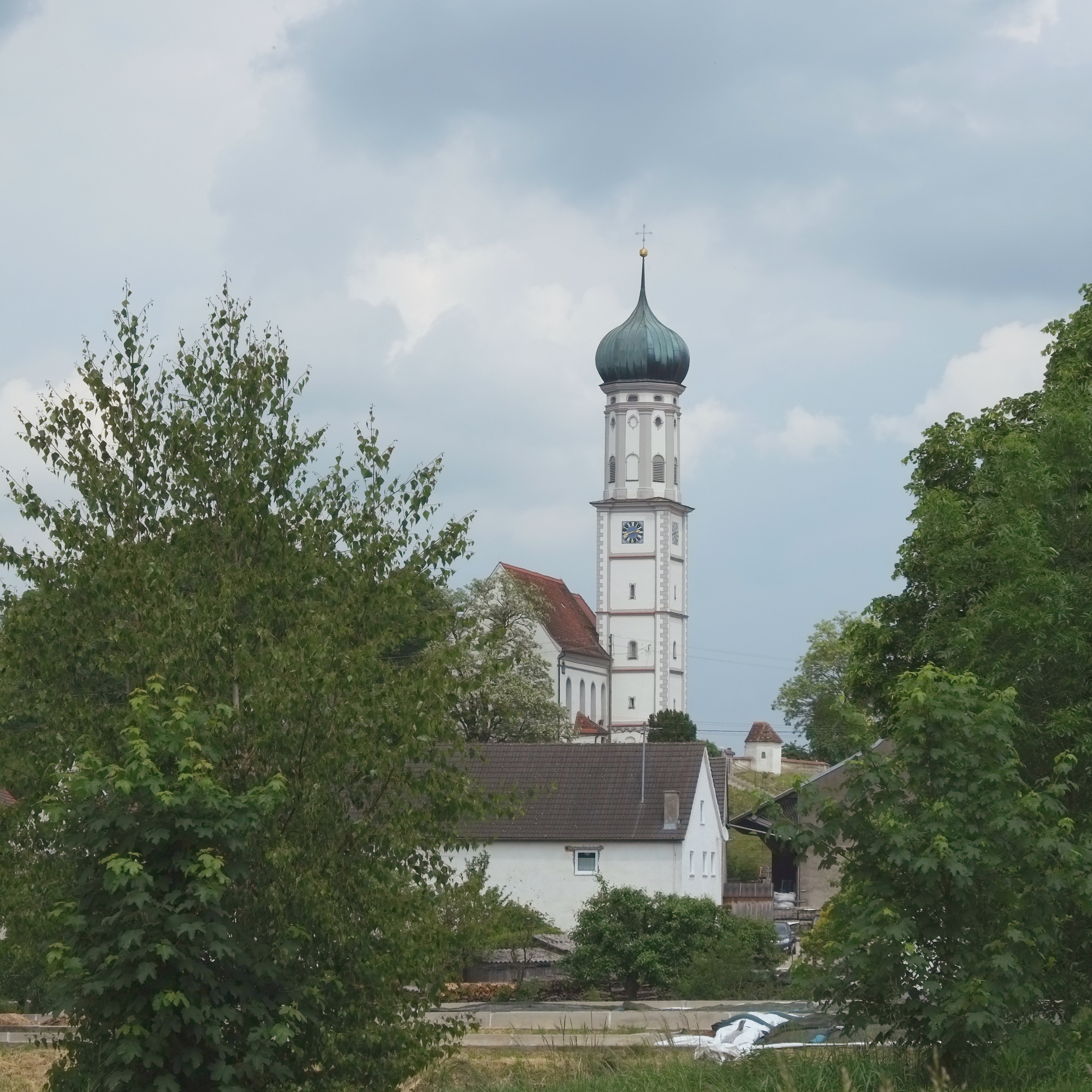 katholische Pfarrkirche St. Margaretha in Breitenbronn (Dinkelscherben), einem Ortsteil von Dinkelscherben im Landkreis Augsburg (Bayern)